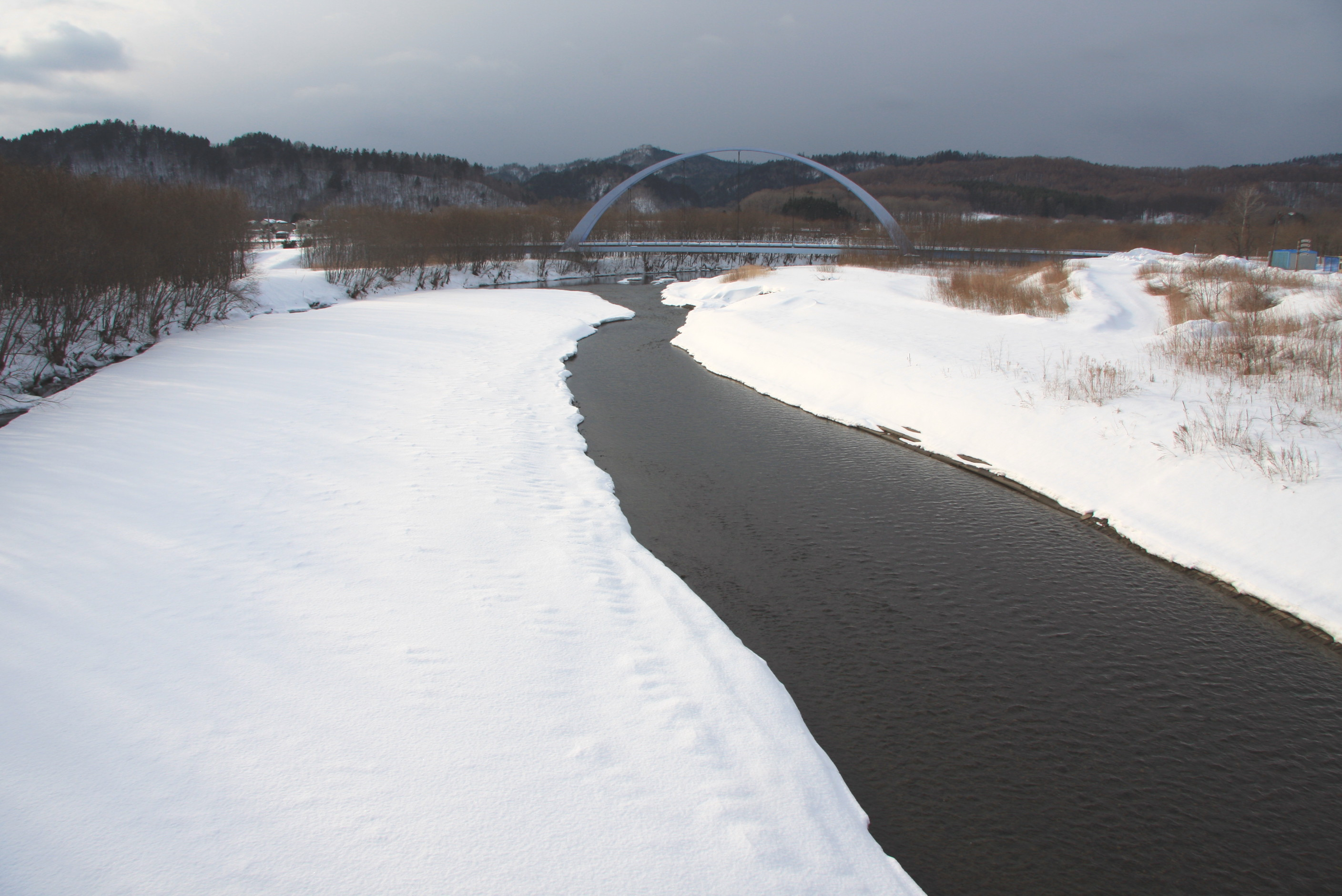 阿寒川水系 舌辛川